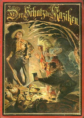 Buchdeckel von Der Schatz des Kaziken. Abenteuer und Kämpfe eines jungen Deutschen mit den Desperados im fernen Westen. Der reiferen Jugend erzählt von E. von Barfus. Stuttgart, K. Thienemanns Verlag, Anton Hoffmann. (1890).